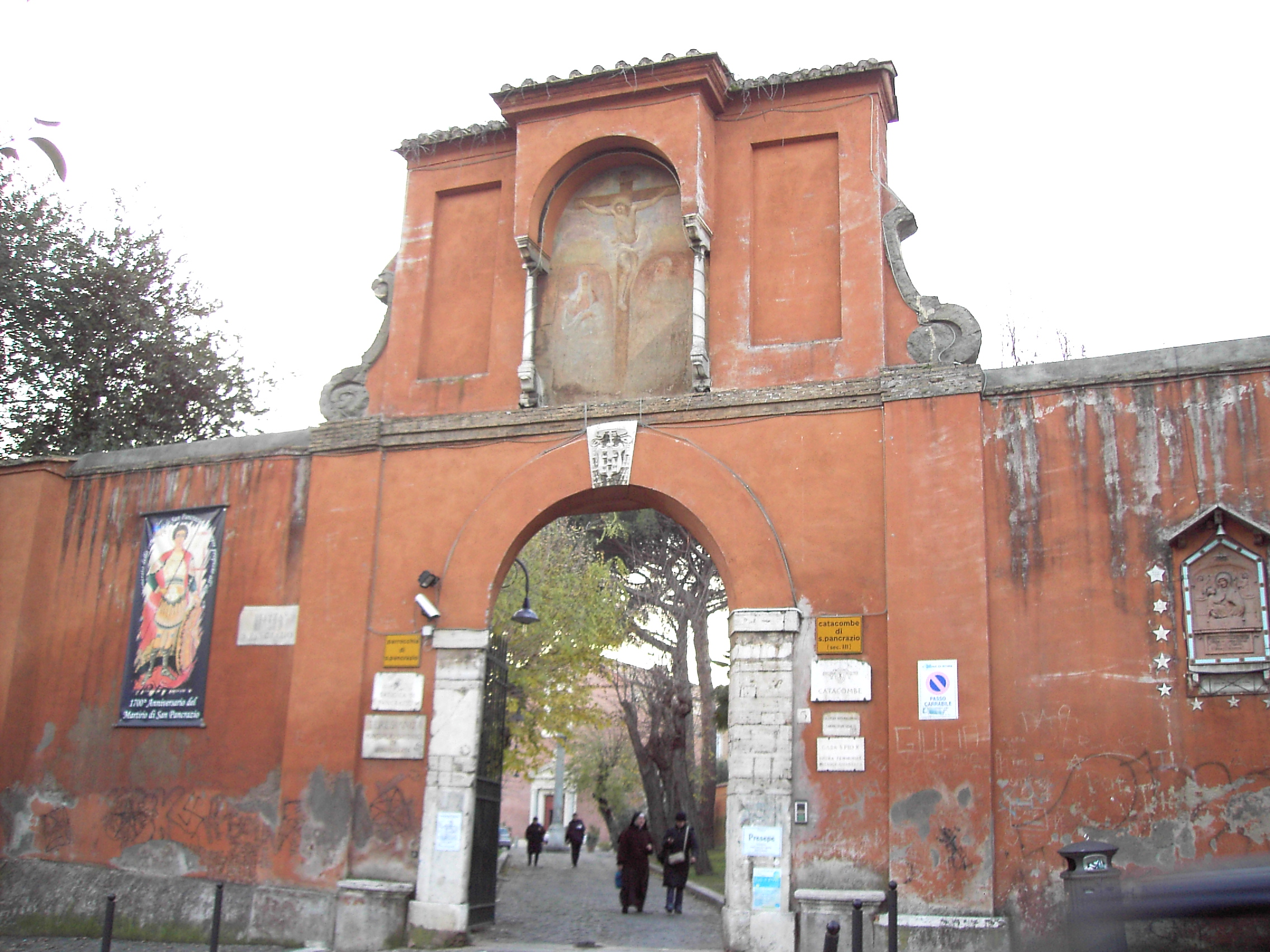 Roma, chiesa di san Pancrazio - ingresso alla basilica e alle catacombe.